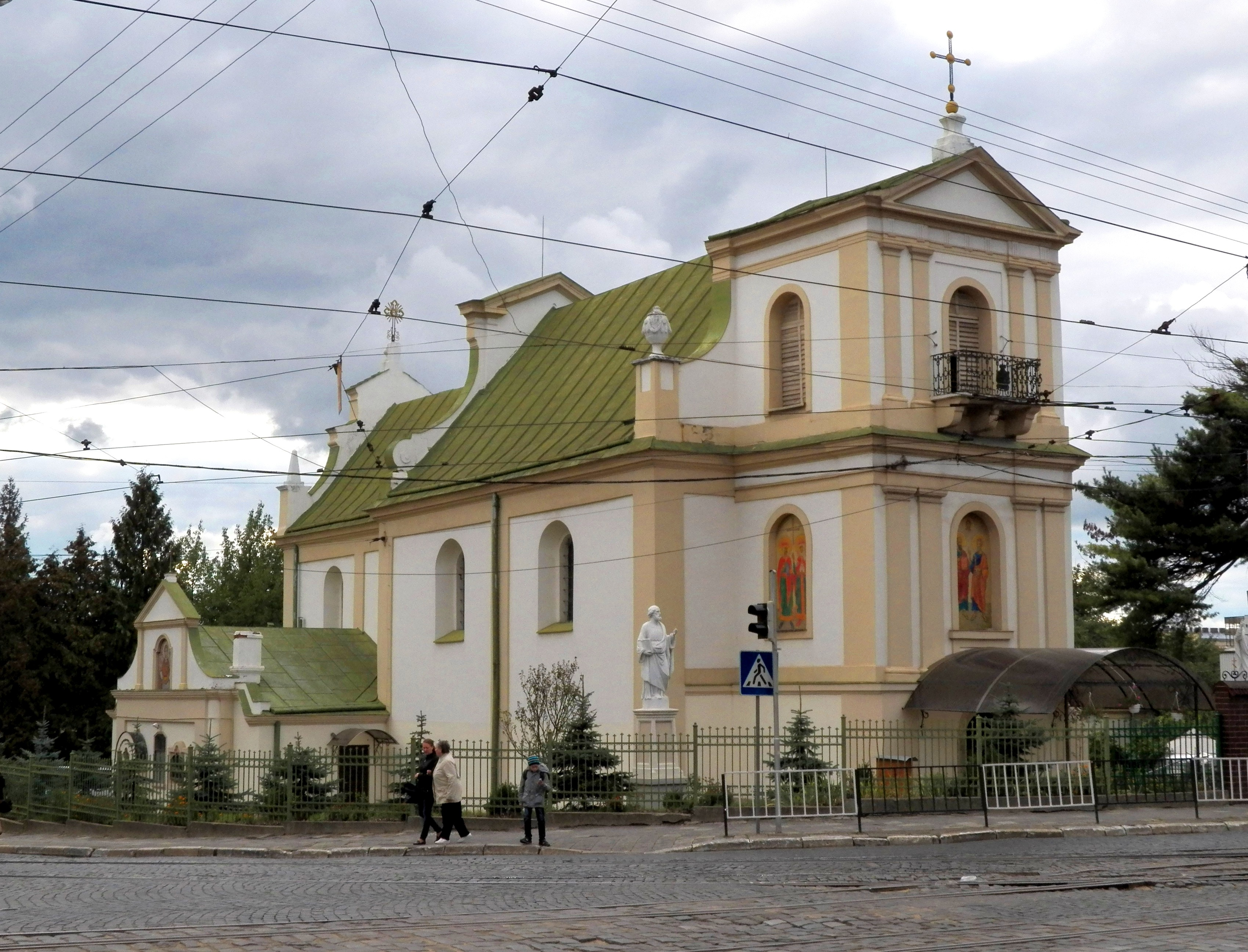 церква Петра і Павла, Львів, Личаківська, 82а